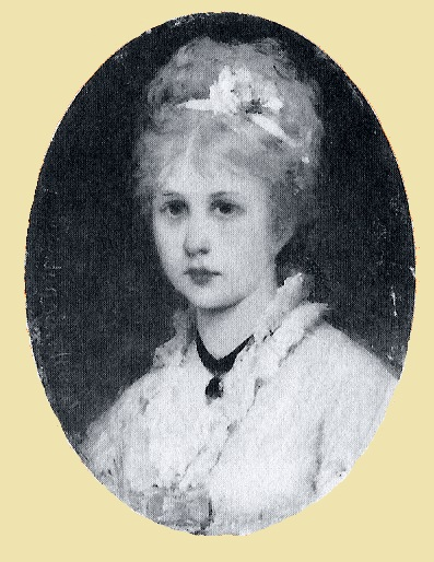 Helene Hallberger um 1870, seit 1876 verheiratete Baronin von Reitzenstein